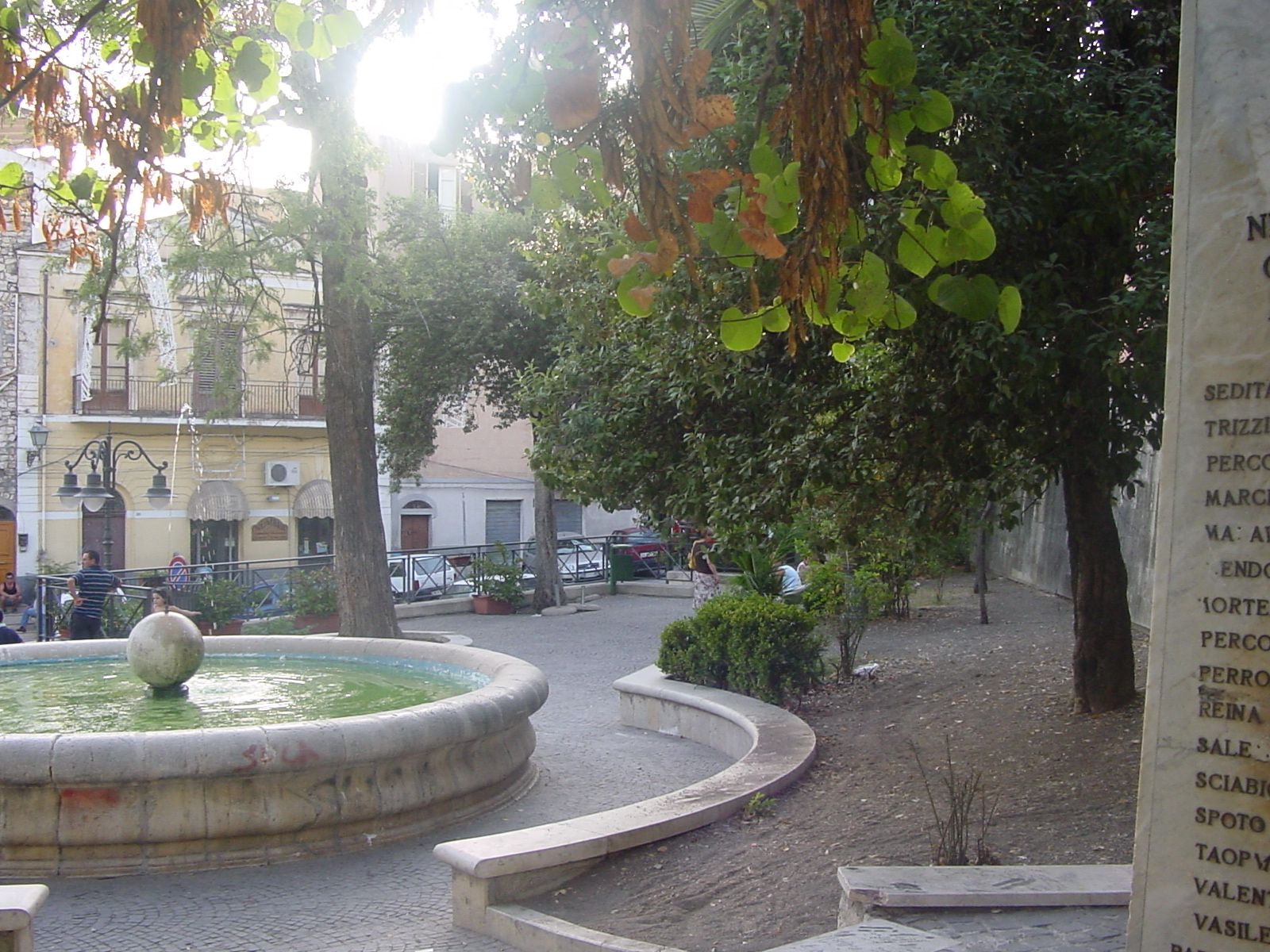 La Villa Comunale